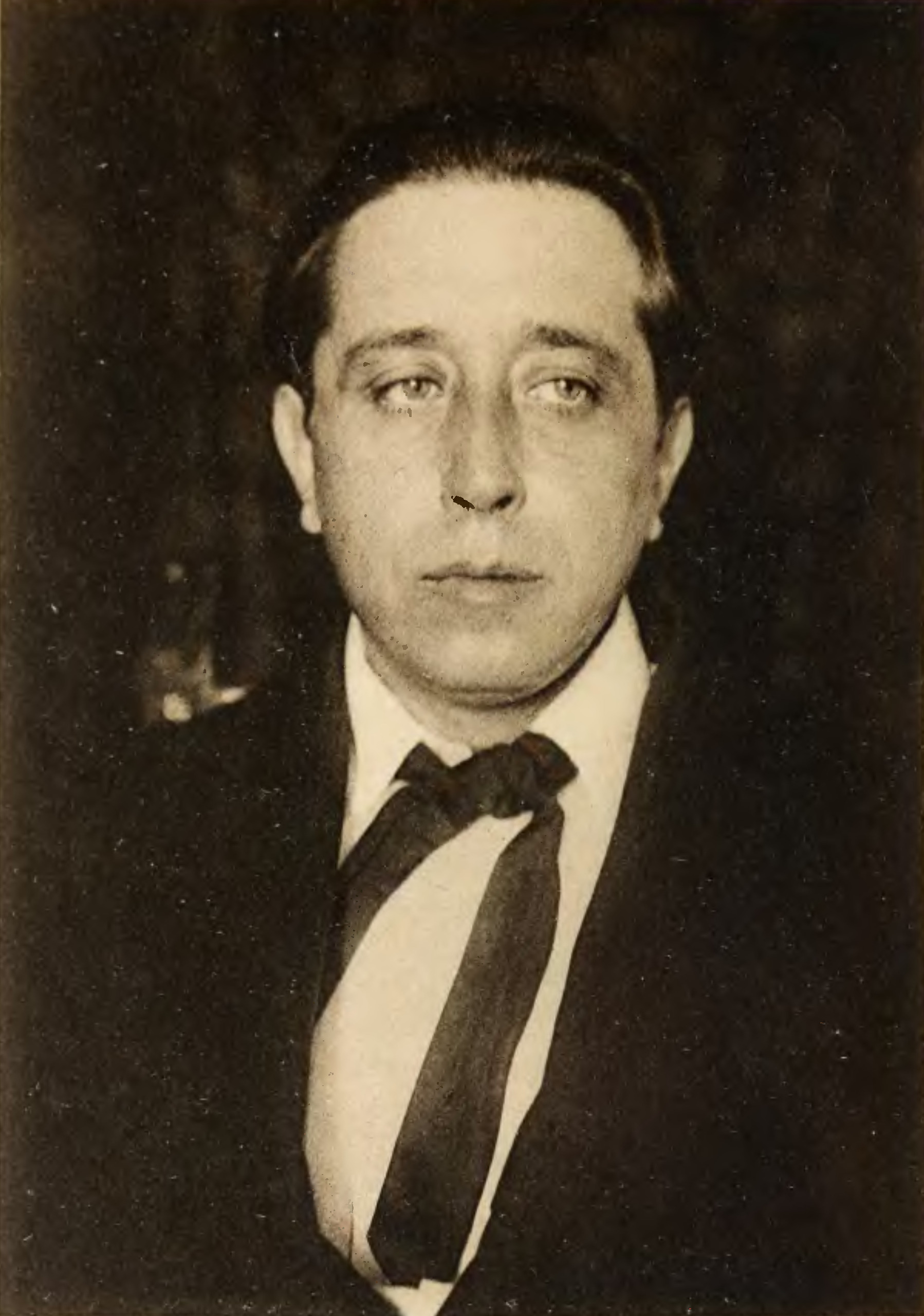 Escritor español Gabriel Miró.